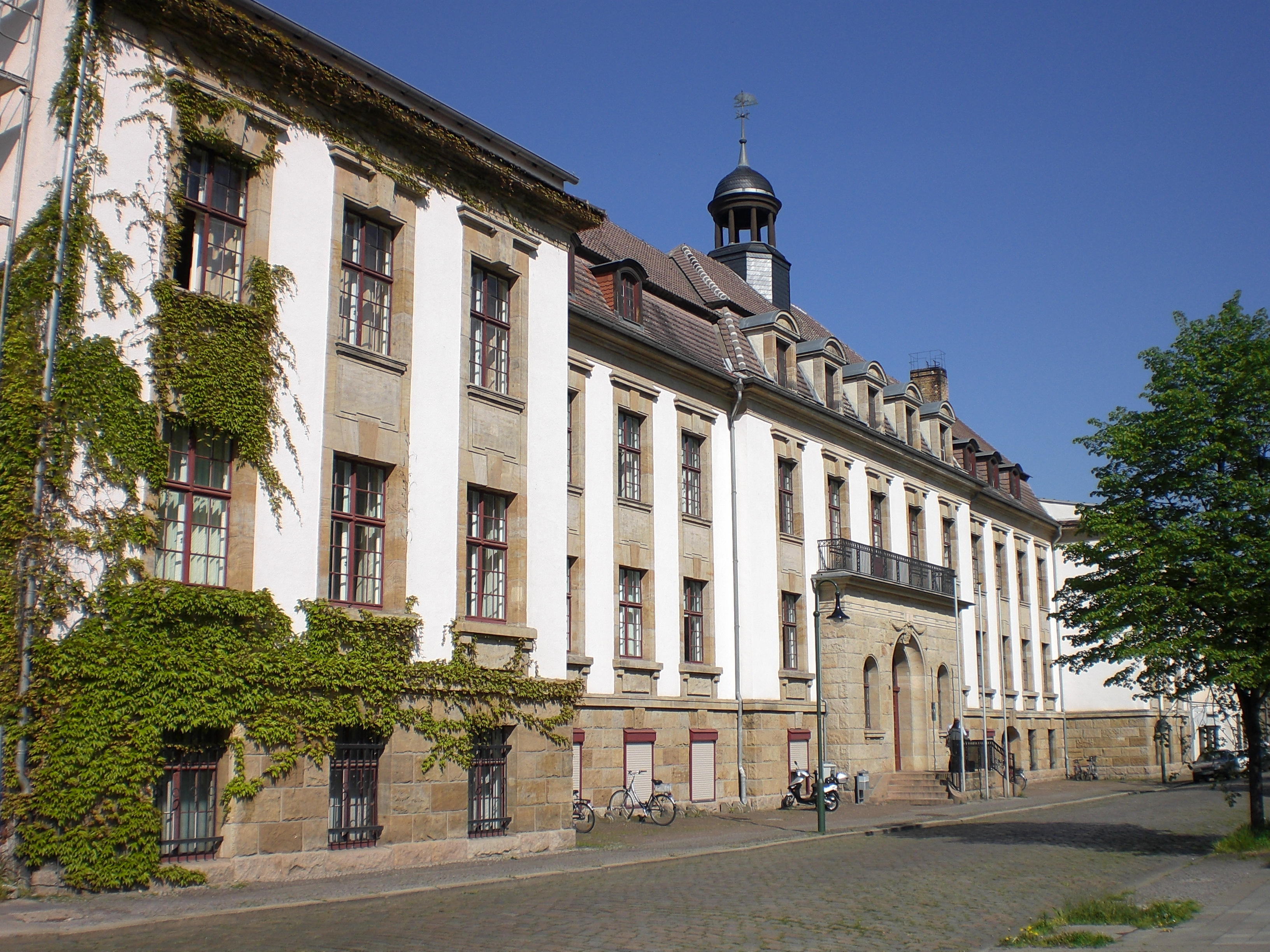 Amtsgericht Dessau-Roßlau